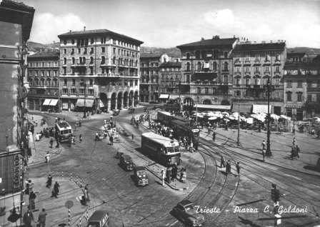 Trieste - Piazza Goldoni